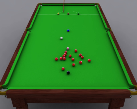 Still from Media:Snooker break.ogg